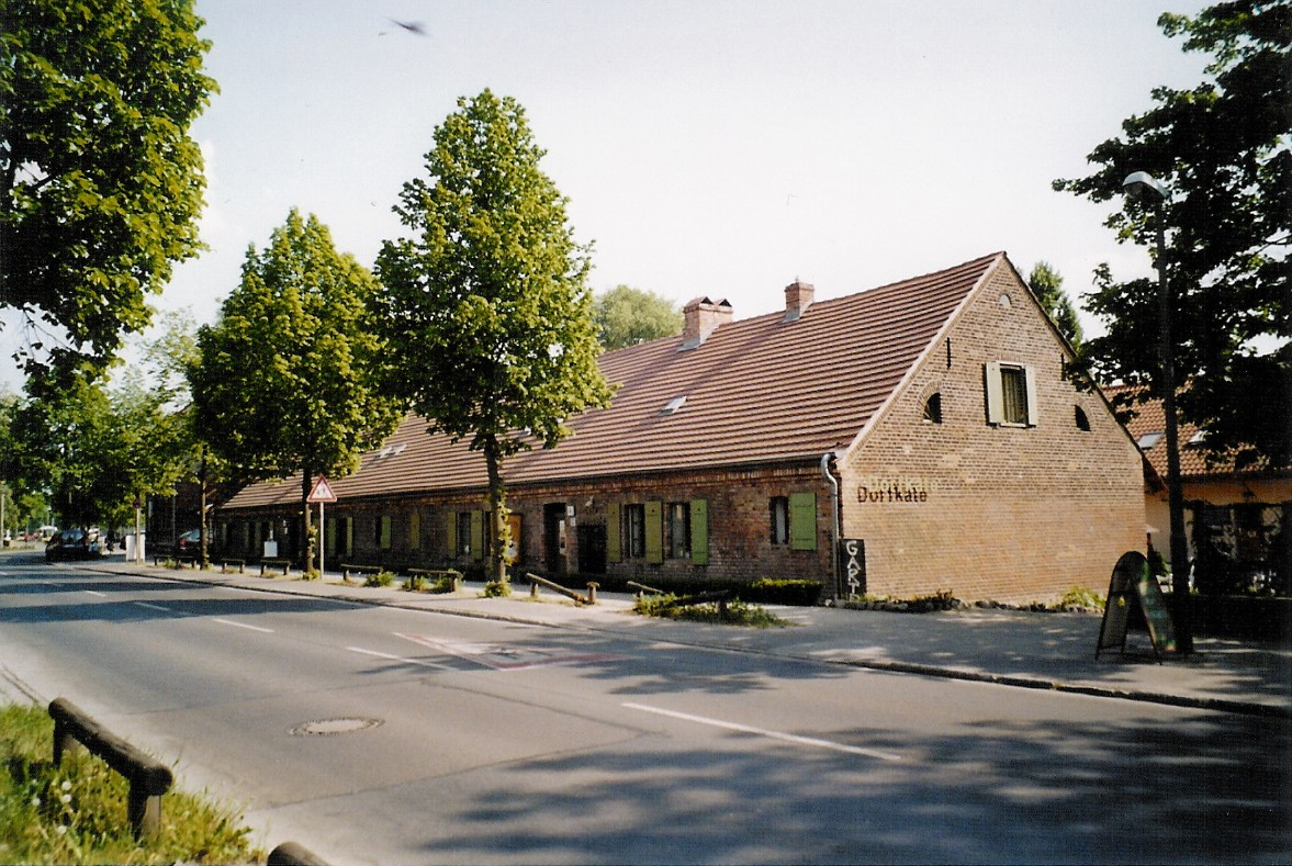 Die Dorfkate in Berlin-Falkenberg